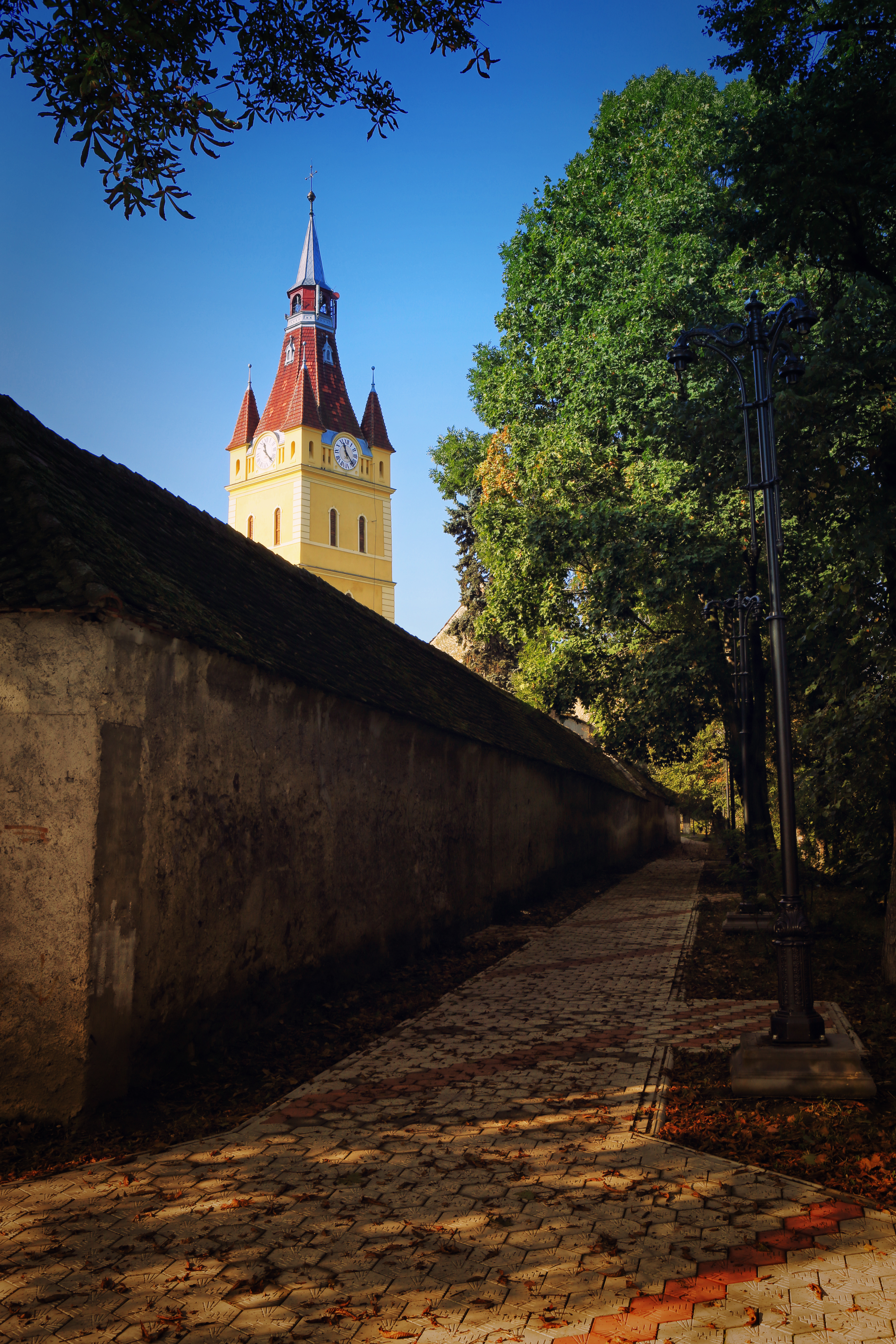 Dublă incintă fortificată, cu turnuri și barbacană 02